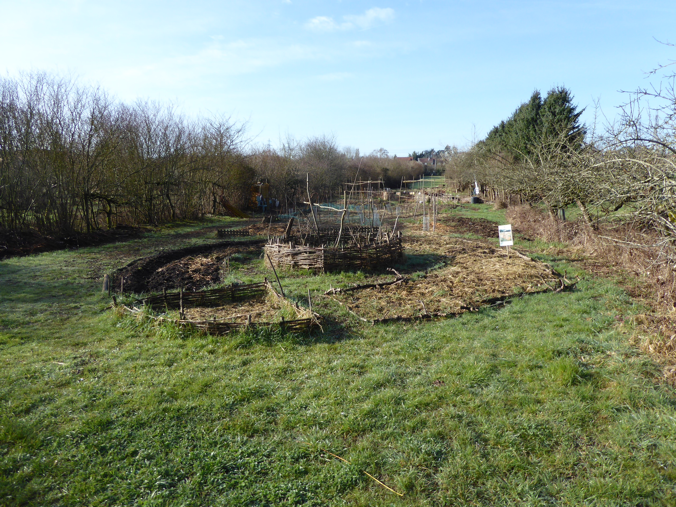 La vallée comestible